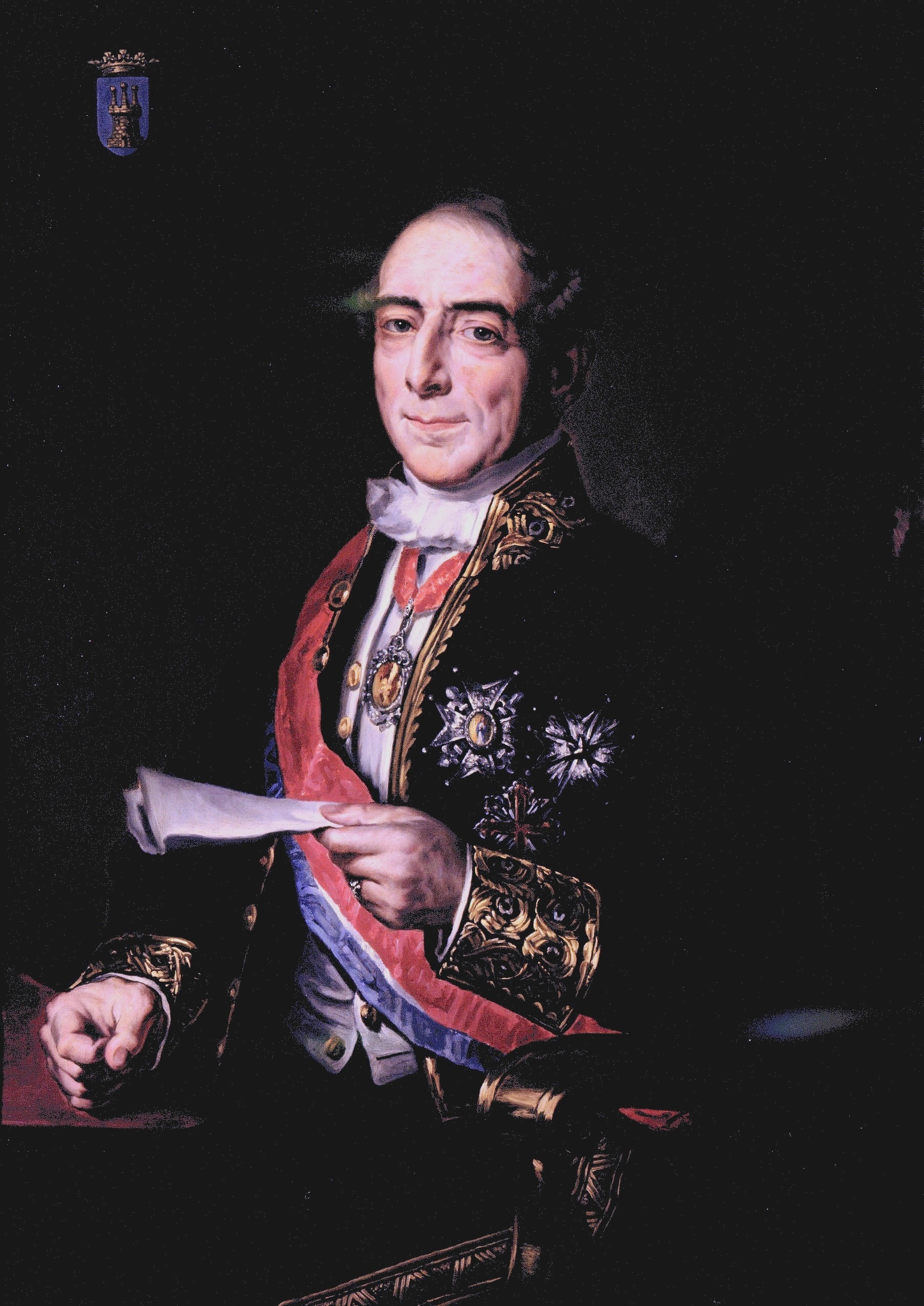 Retrato del político y militar español Antonio González y González (1792-1876), que llegó a ser presidente del Consejo de Ministros de España durante el reinado de Isabel II y también presidente del Congreso de los Diputados y ministro en varias ocasiones.